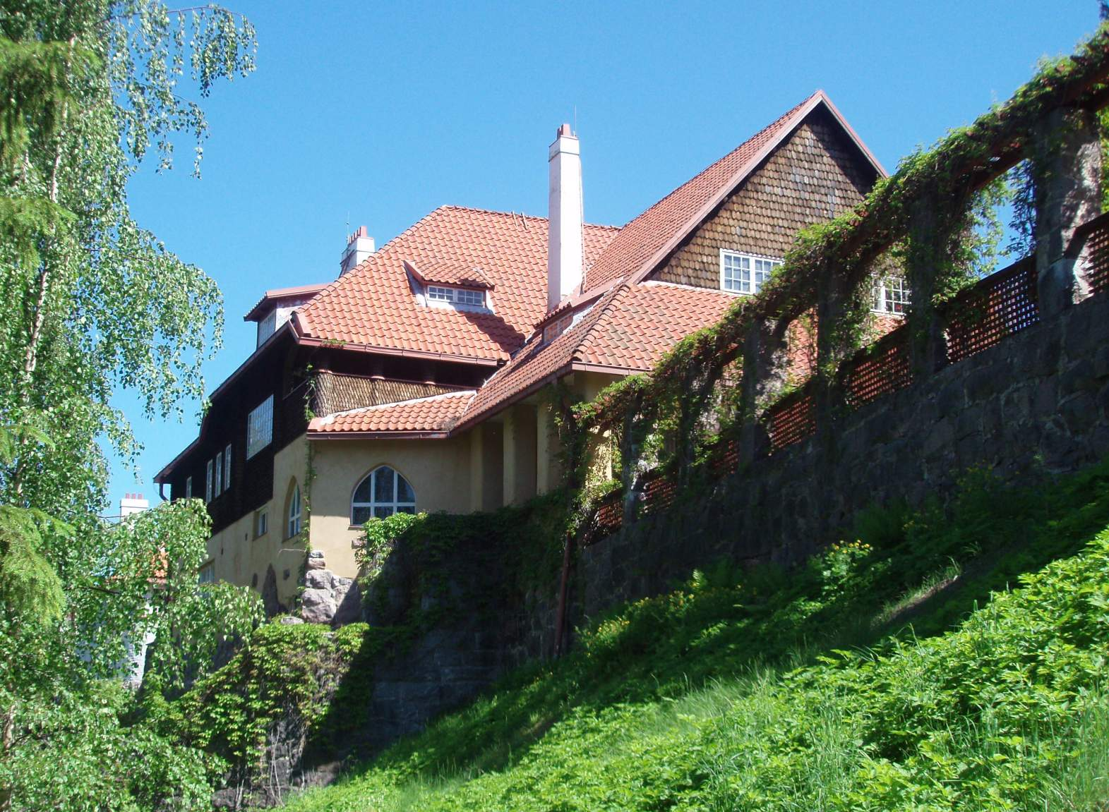 Photo of Hvitträsk, Kirkkonummi (Finland)